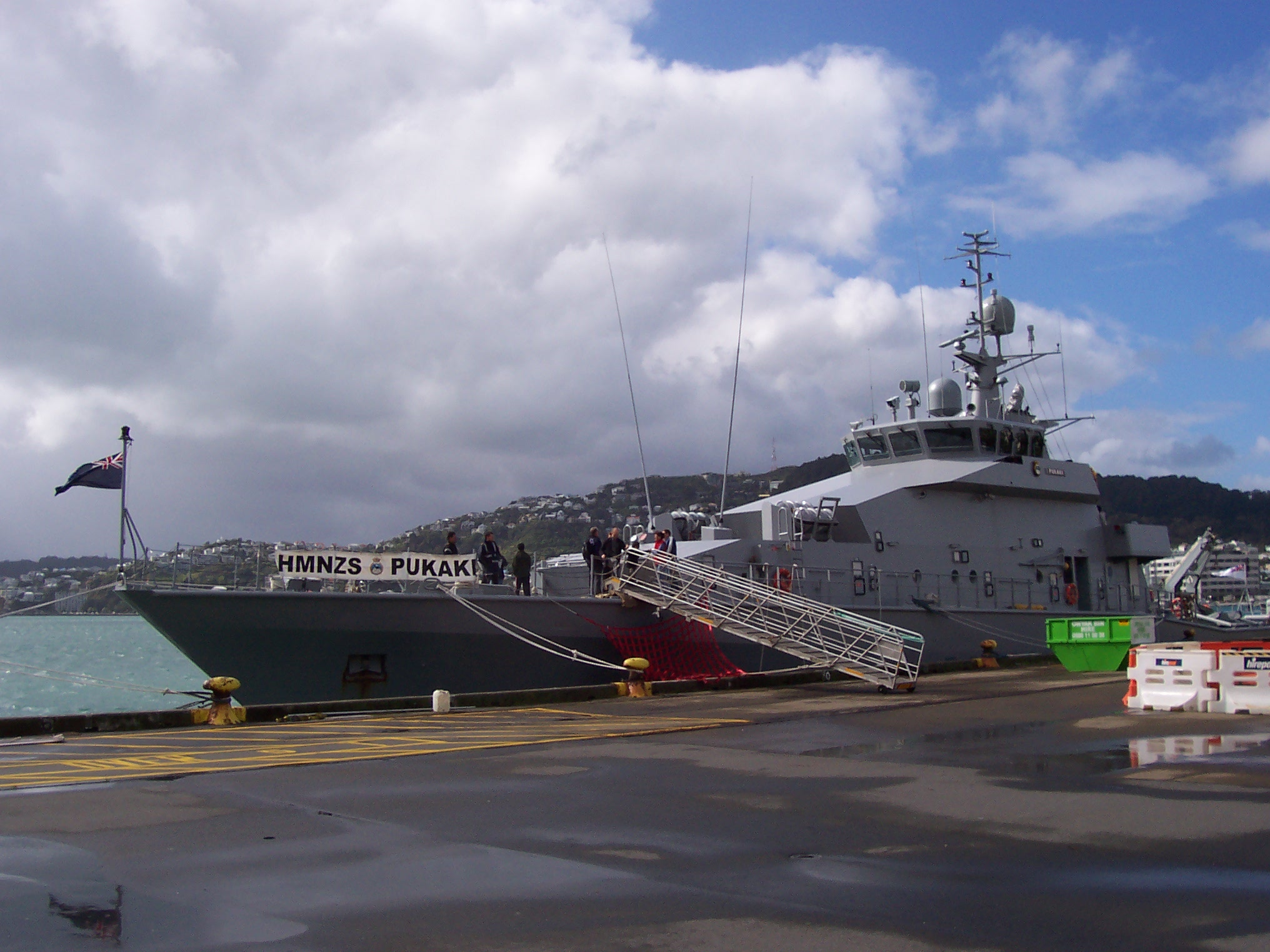 HMZNS Pukaki, P3568